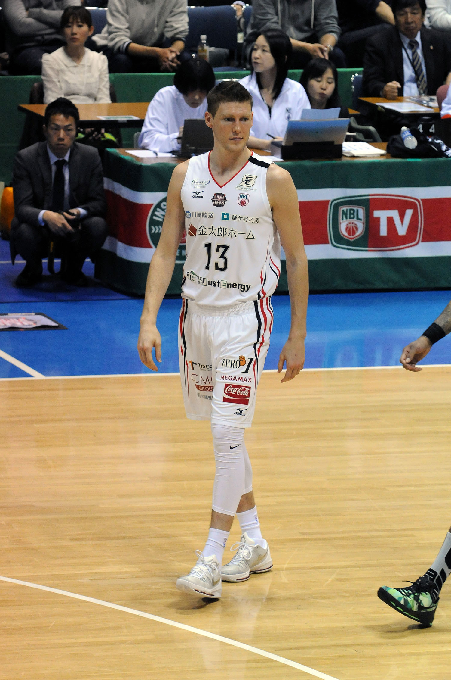 千葉ジェッツ、クリント・チャップマン選手。国立代々木競技場第二体育館で。